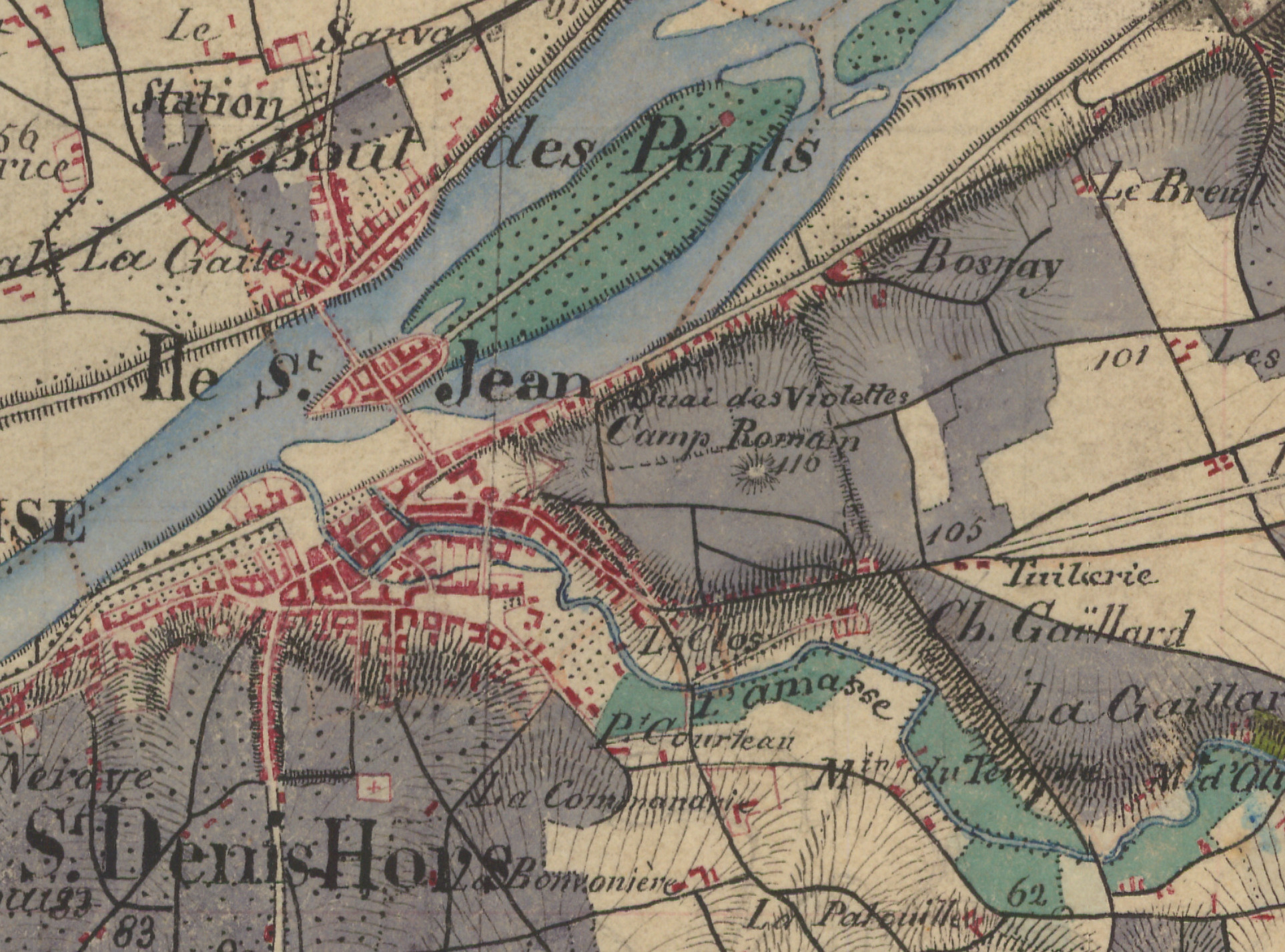 Amboise sur la carte d'État major de 18661866